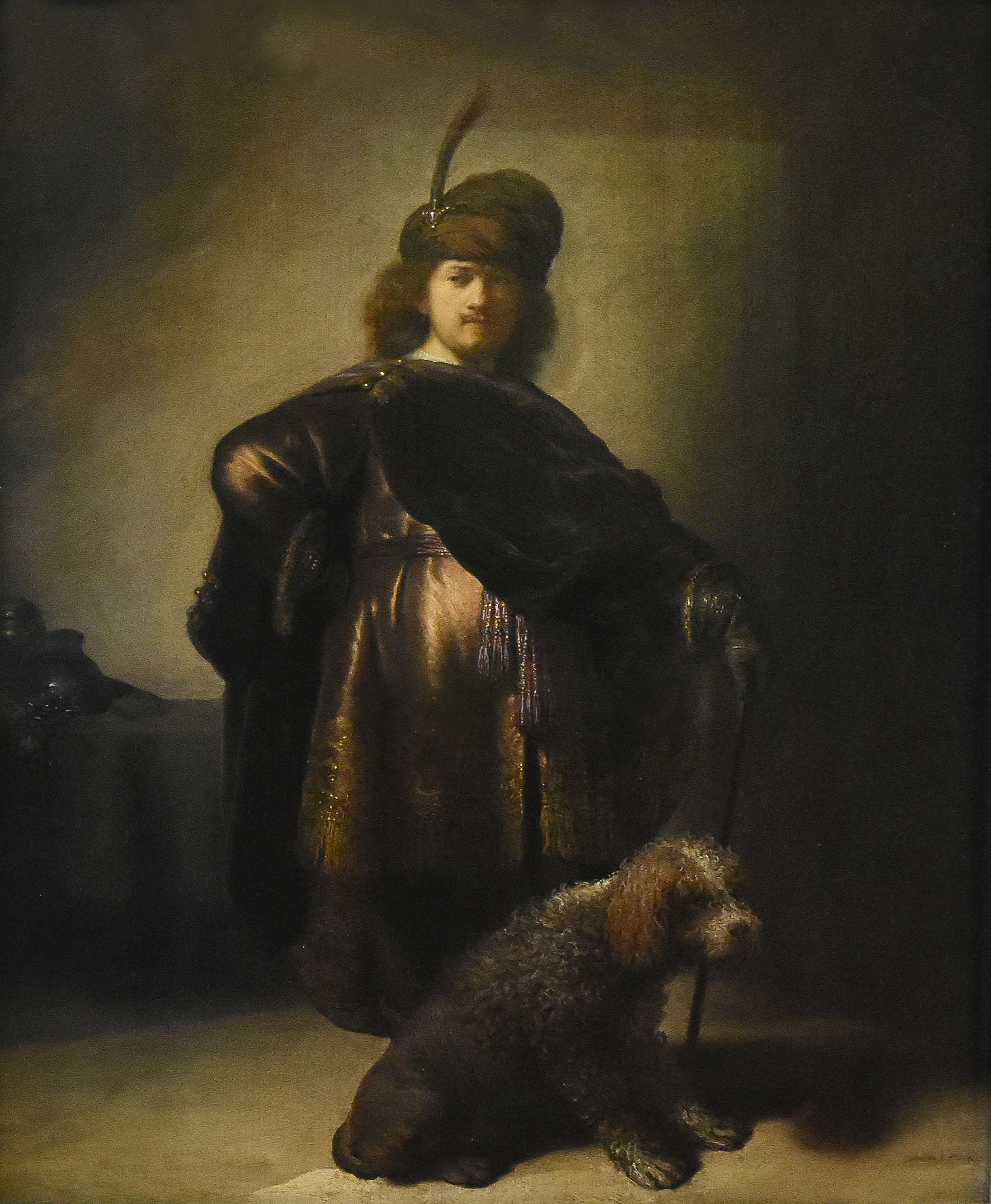 Rembrandt (1606-1669) Zelfportret in oriëntaalse kledij (1631) Petit Palais Parijs